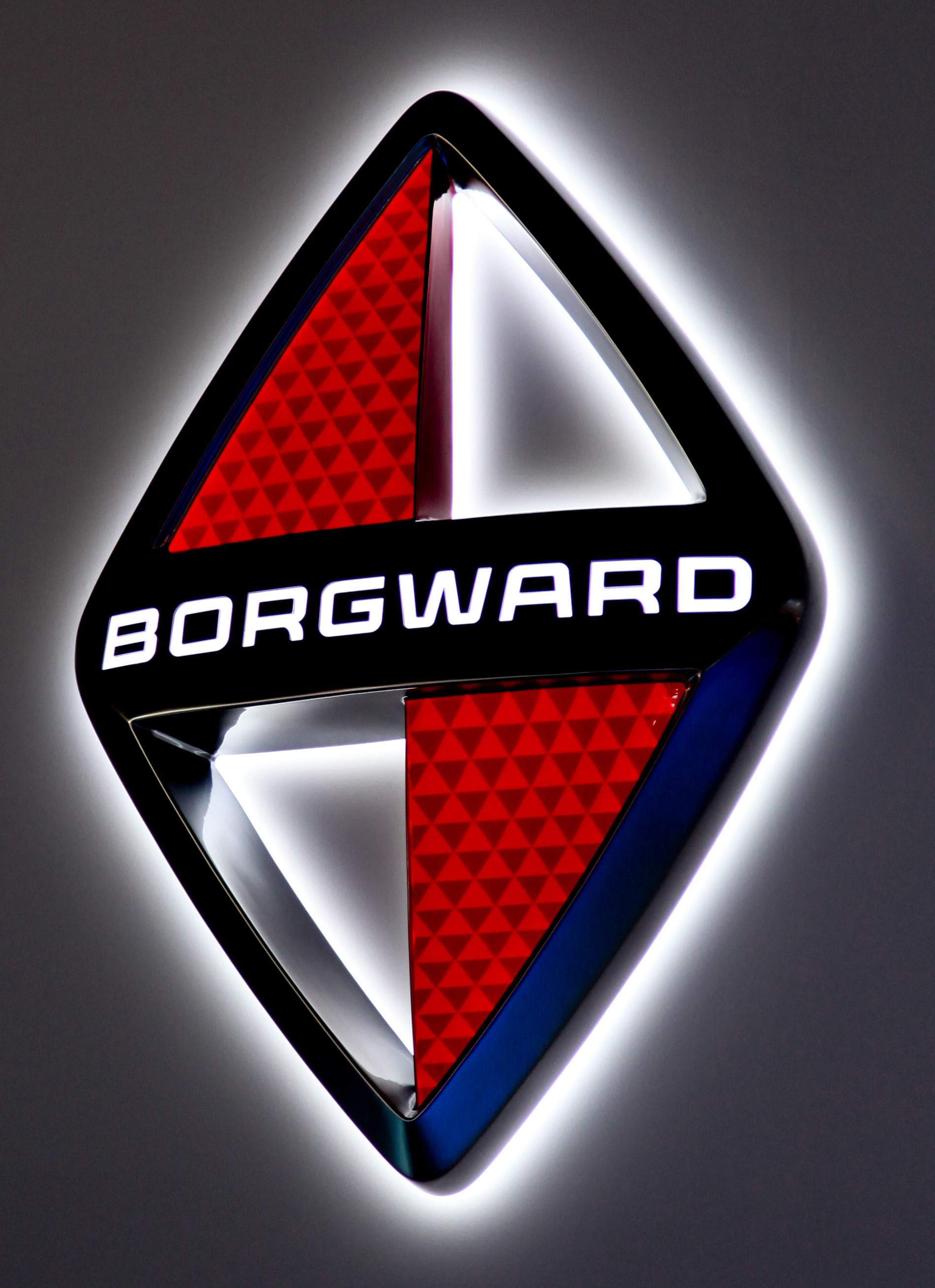 Borgward Logo auf der IAA 2017